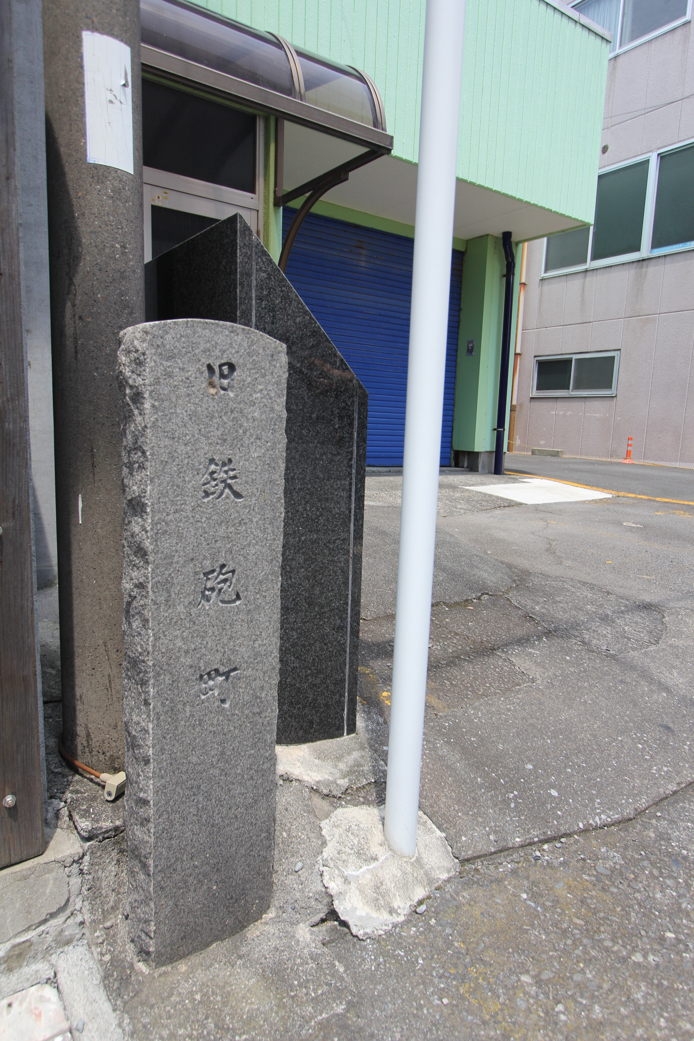 旧鉄砲町石碑 沼津城宿場町 現在大手町 志多町自治会館前